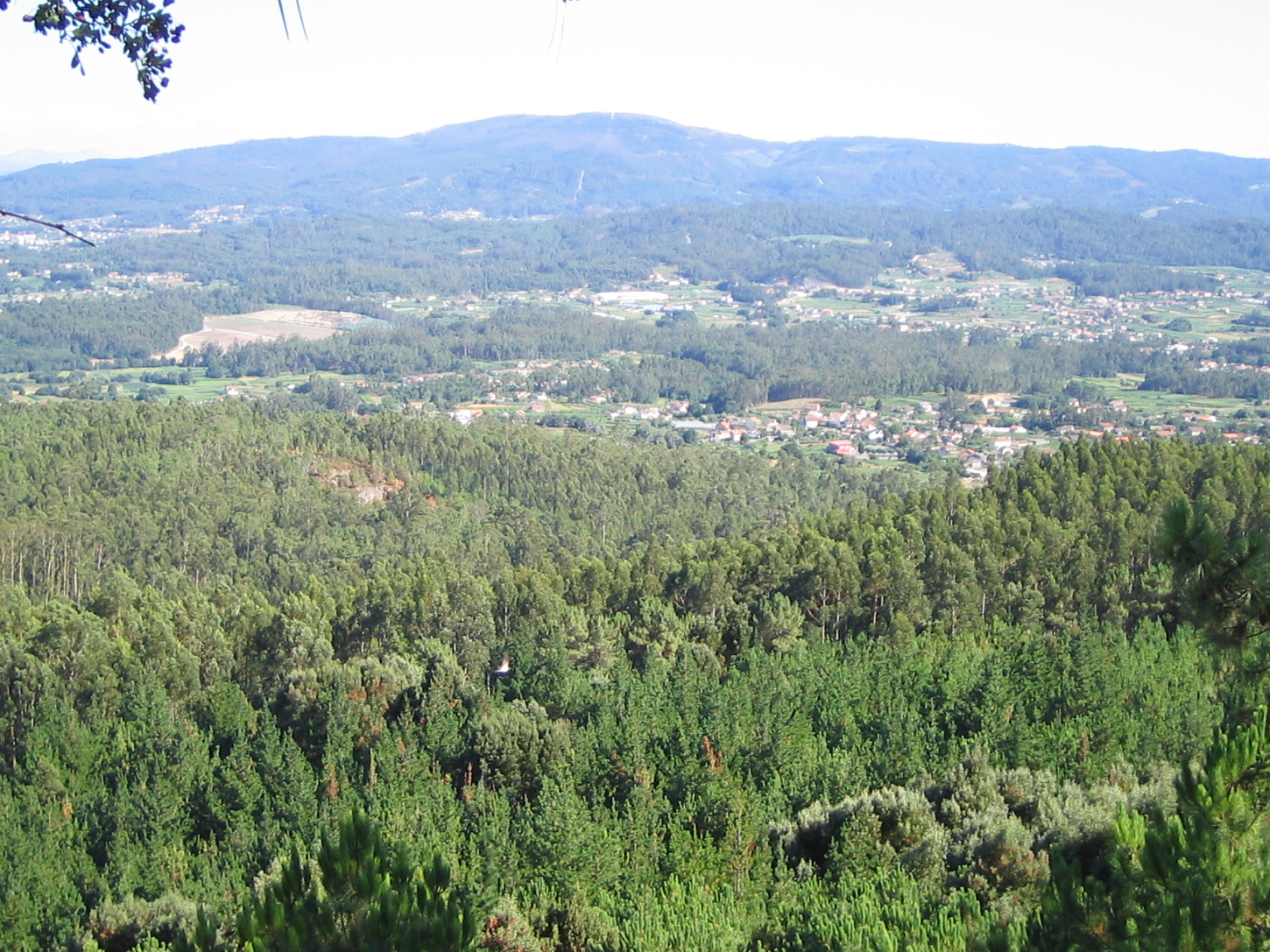 Forest in Villagarcía de Arousa, Spain